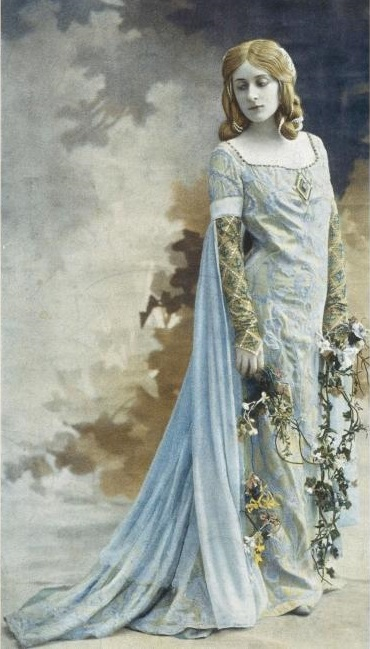 Mary Garden, créatrice du rôle de Mélisande dans l'opéra de Claude Debussy, "Pelléas et Méĺisande", d'après la pièce de Maurice Maeterlinck.